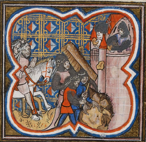 Siège d'Acre (1291)